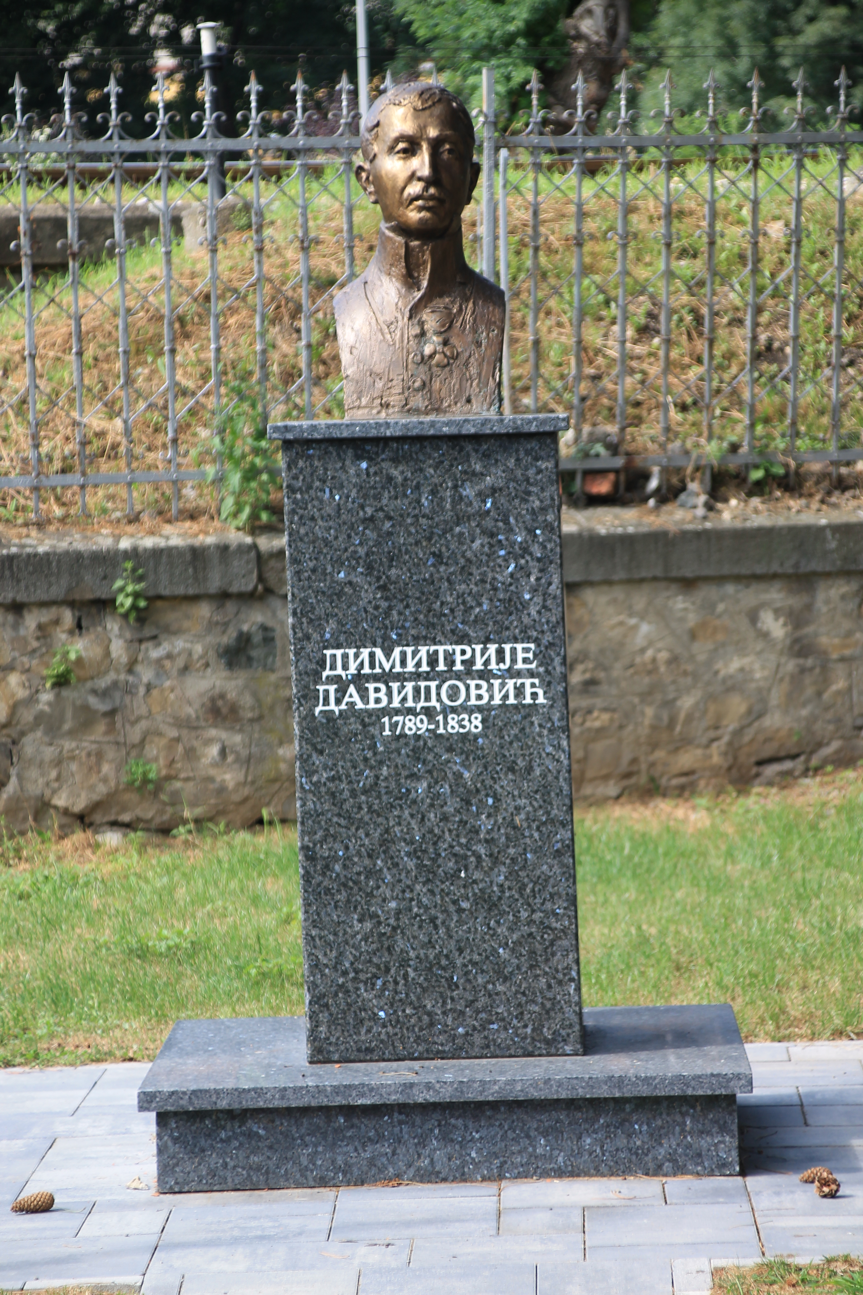 Stara skupština